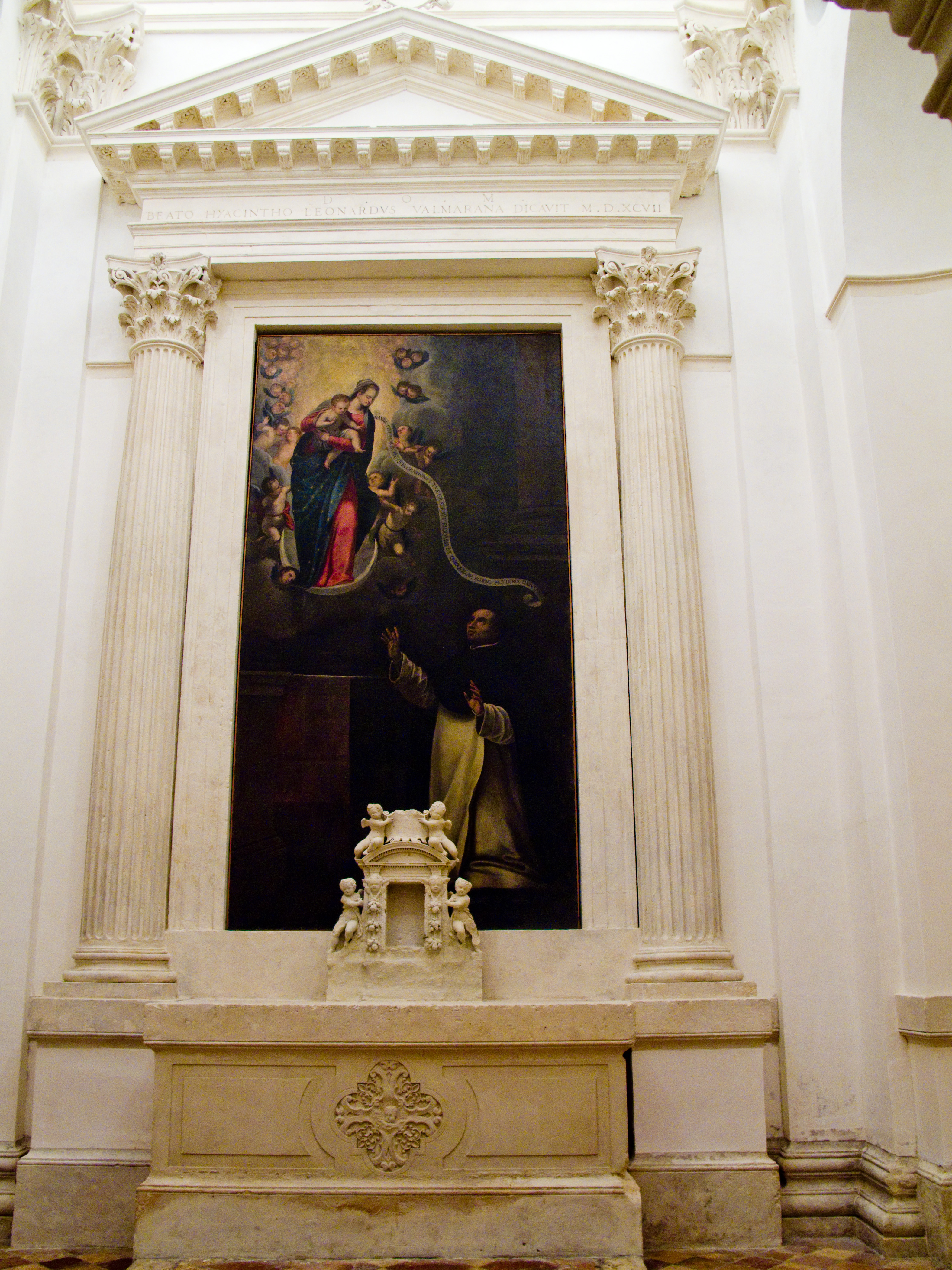 Vicenza - Chiesa di Santa Corona - Cappella Valmarana